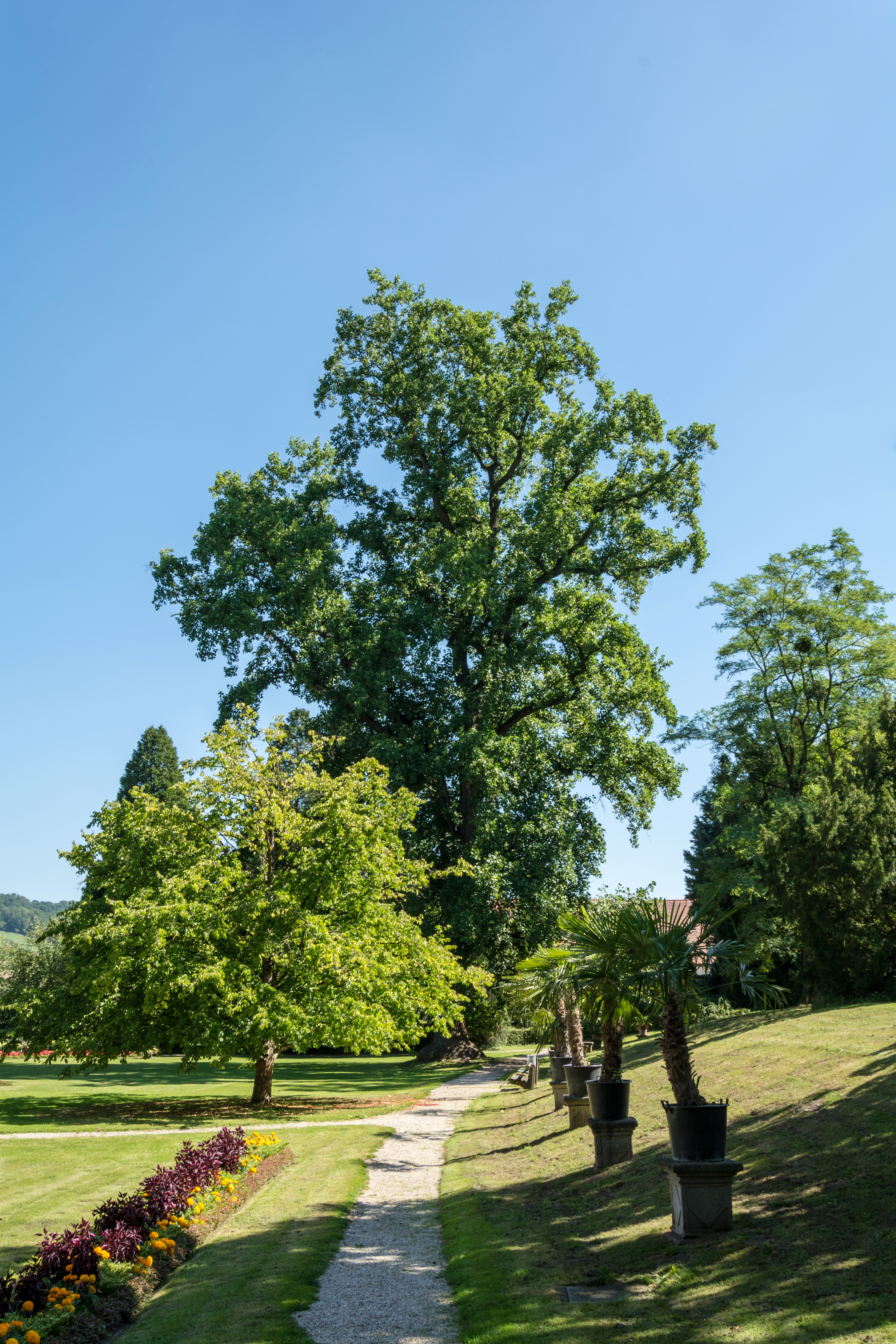 Dieser Tulpenbaum steht im Park des Stiftes Wilhering. Er dürfte etwa 200 Jahre alt sein . 1962 wurde er zusammen mit einem Mammutbaum und einer Eibe zum Naturdenkmal erklärt. This media shows the natural monument in Upper Austria with the ID nd029.